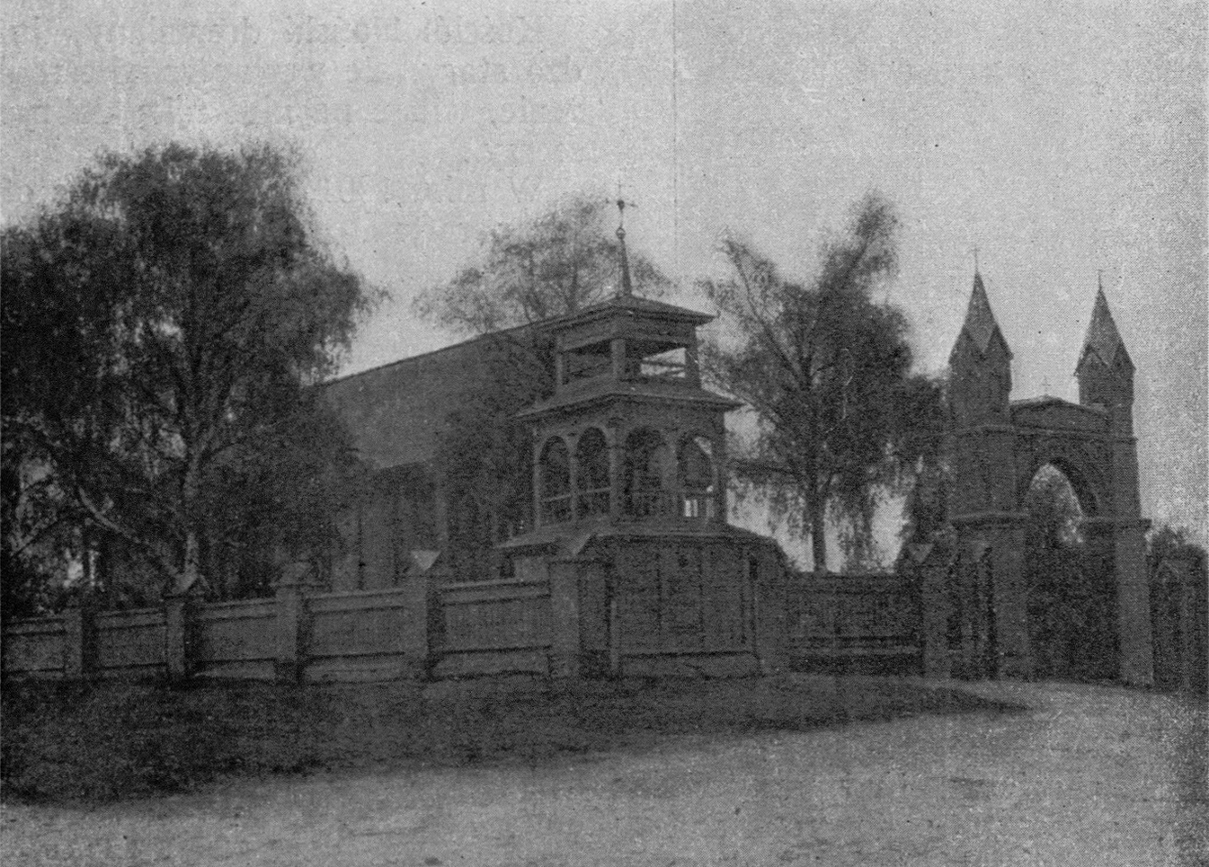 Беларуская (тарашкевіца): Каралішчавічы (Karališčavičy). Касьцёл Апекі Маці Божай